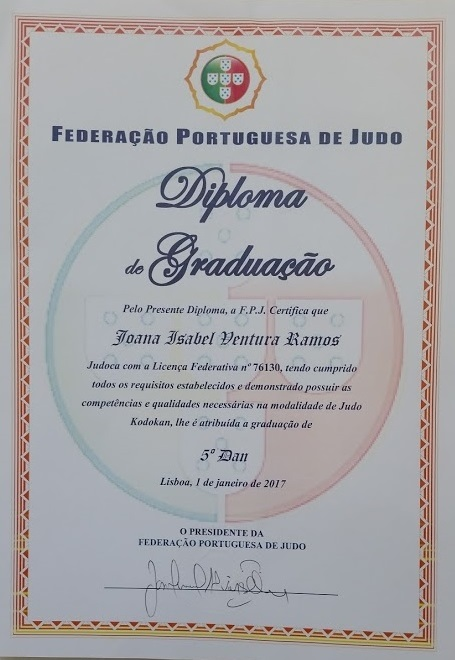 Diploma de Graduação de 5ª DAN de Joana Ramos, pela FPJ, em 1/7/2017, face aos seus resultados obtidos ao longo da carreira desportiva